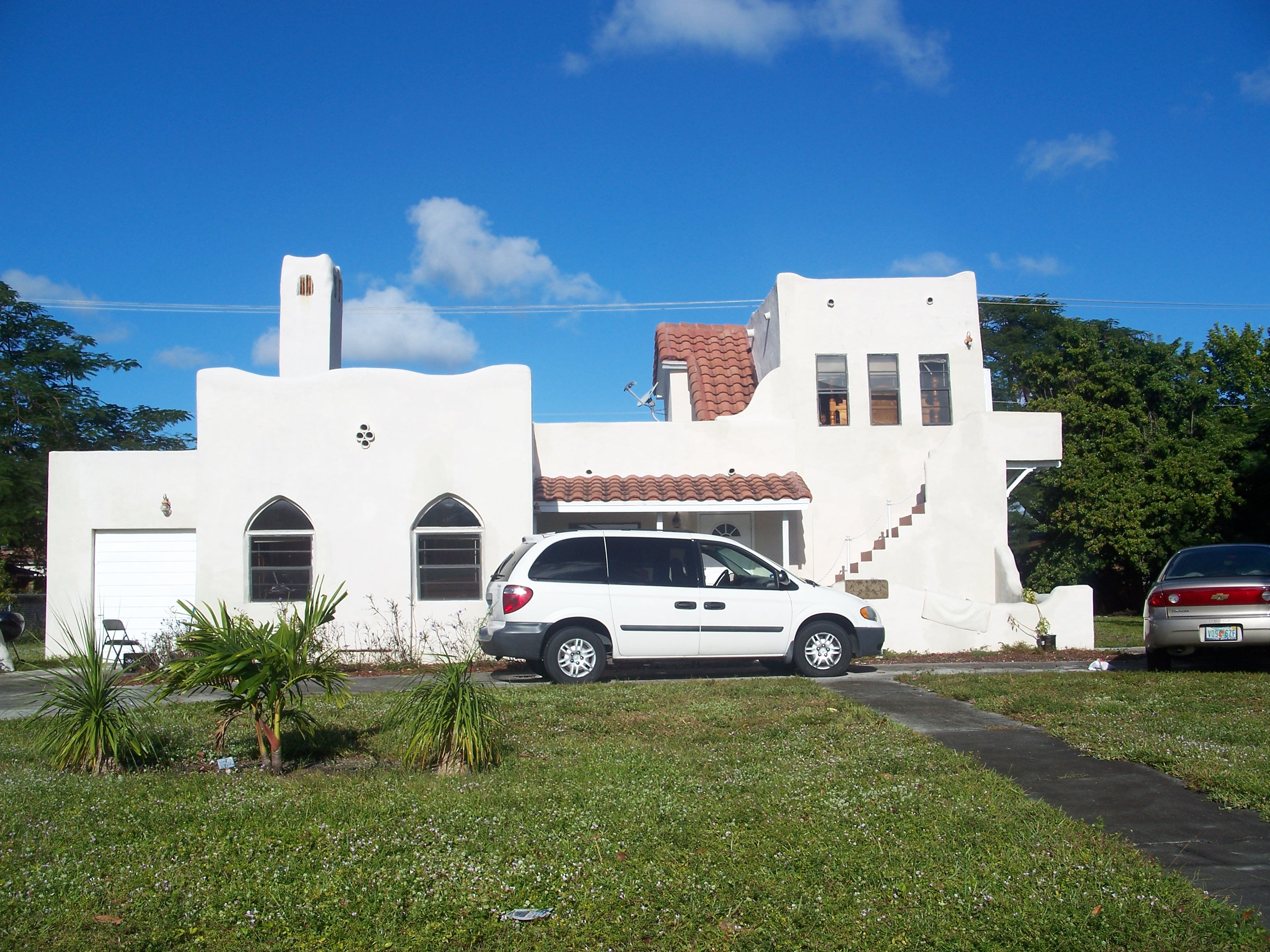 Opa-Locka, Florida: Long House